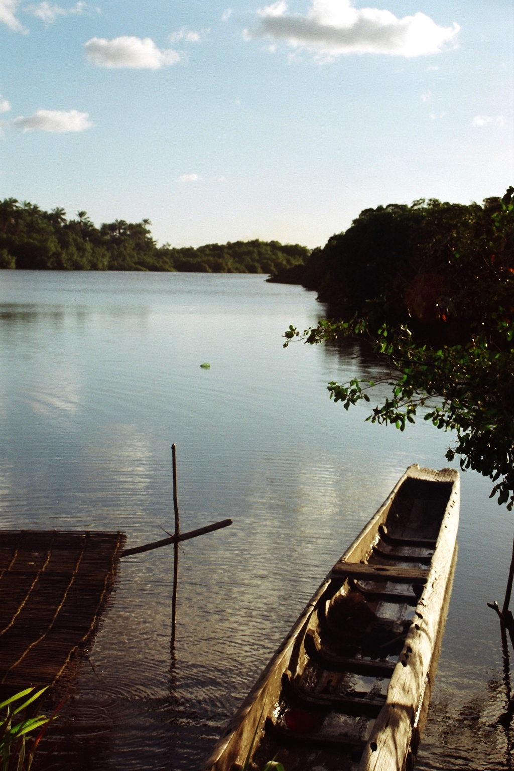 Você já foi a Bahia, nego? Então vá